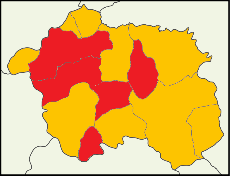 Eskişehir'de 2014 Türkiye cumhurbaşkanlığı seçimi